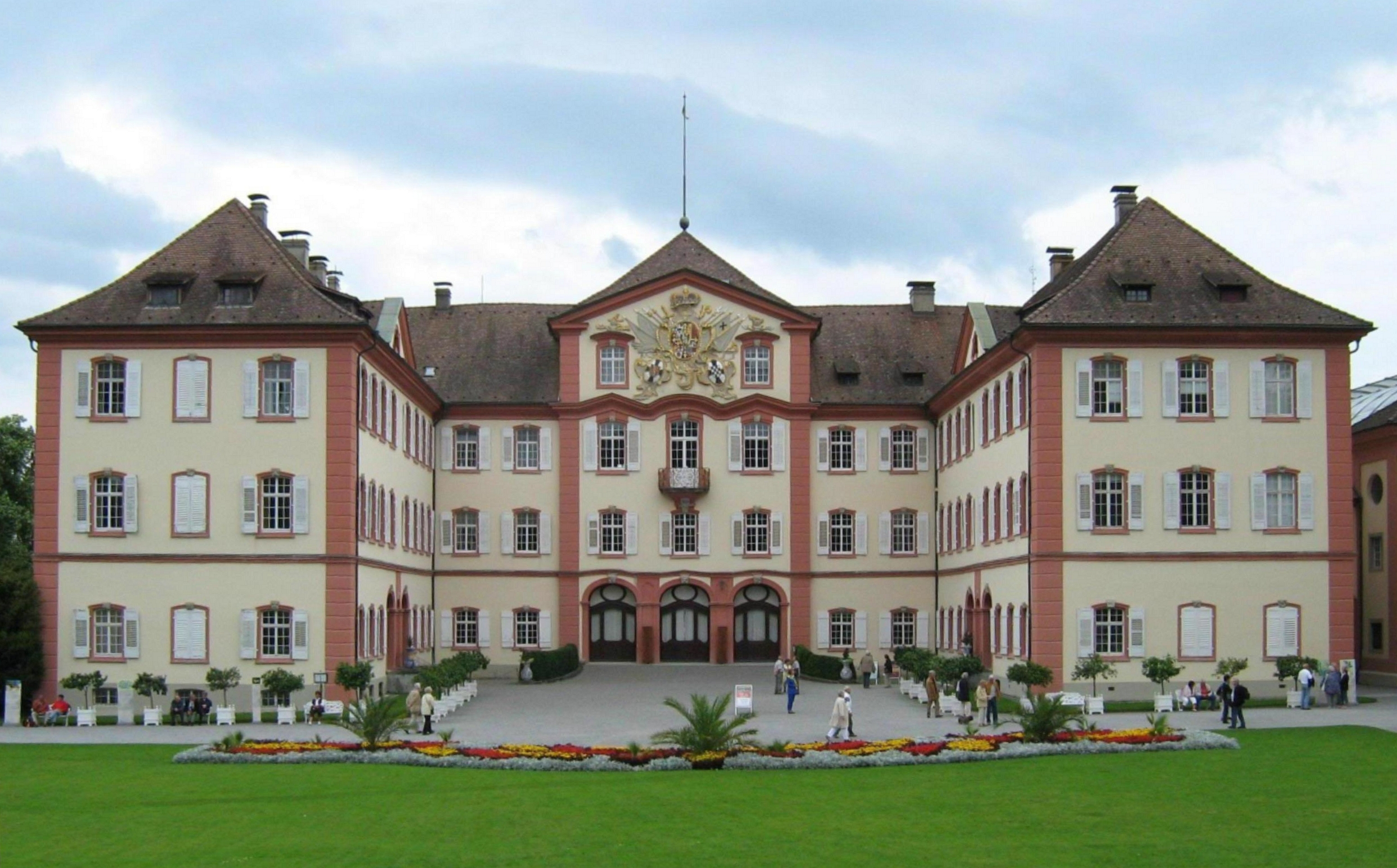 Schloss auf der Blumeninsel Mainau am 03.09.2007